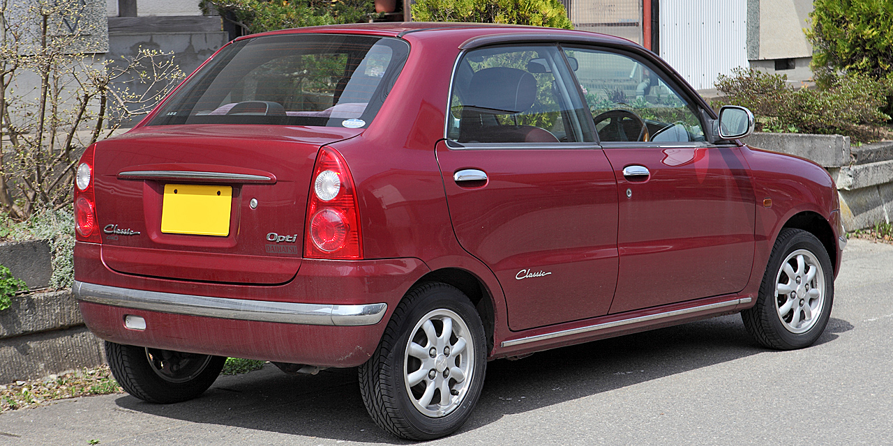 Daihatsu Opti Classic (GH-L800S, '00 03 - '01 10)